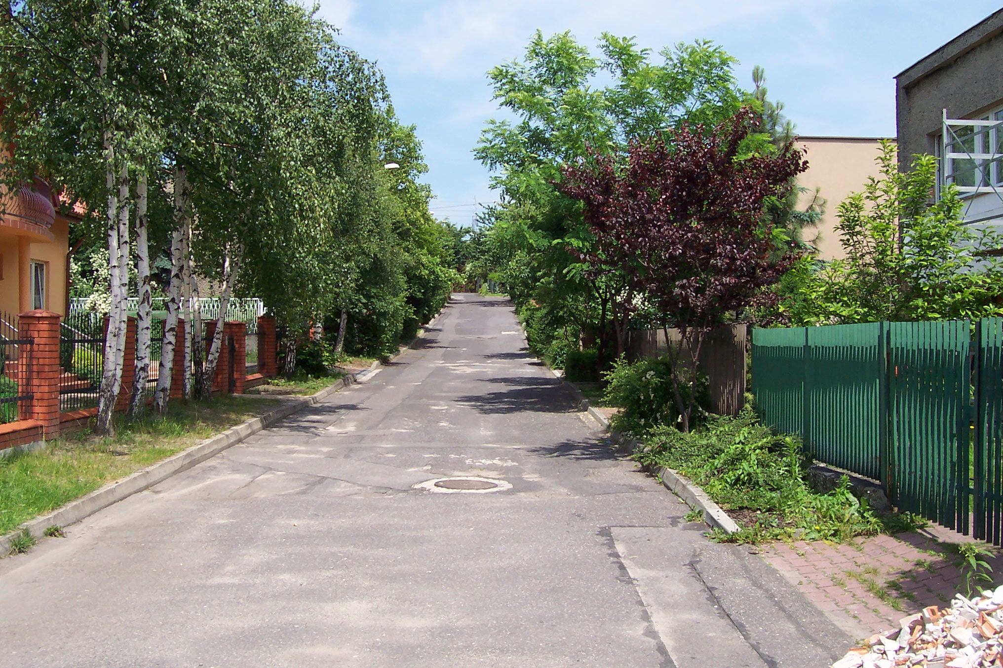 Katowice, Brynów, kępowa street. Author : Krzysztof Blachnicki